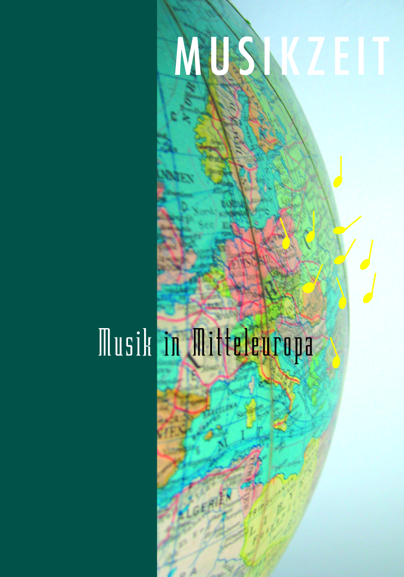 Österreichische MUSIKZEITschrift "Musik in Mitteleuropa" (Cover)